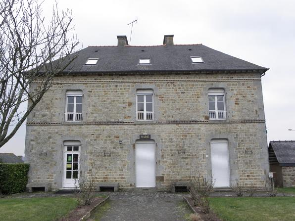 Mairie de Romazy (35).